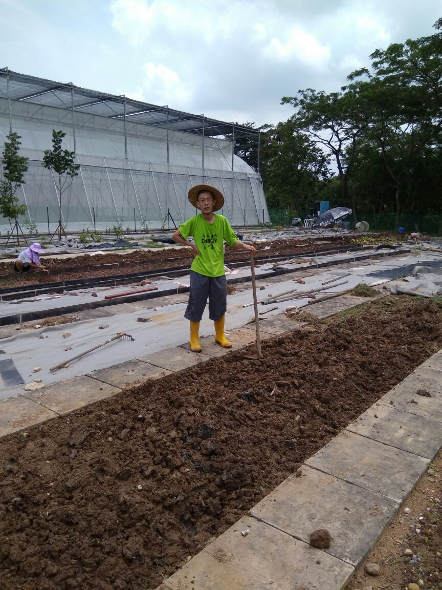 Petani di Kranji